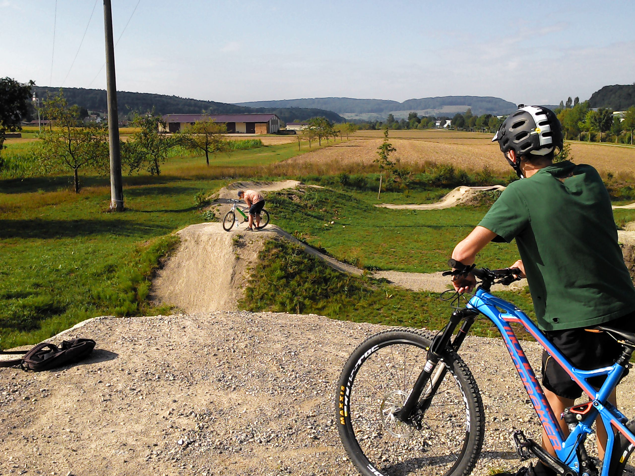 Wutöschingen (Gemeinde), Landkreis Waldshut, Baden-Württemberg. Mountainbike-Gelände "Dirtpark"